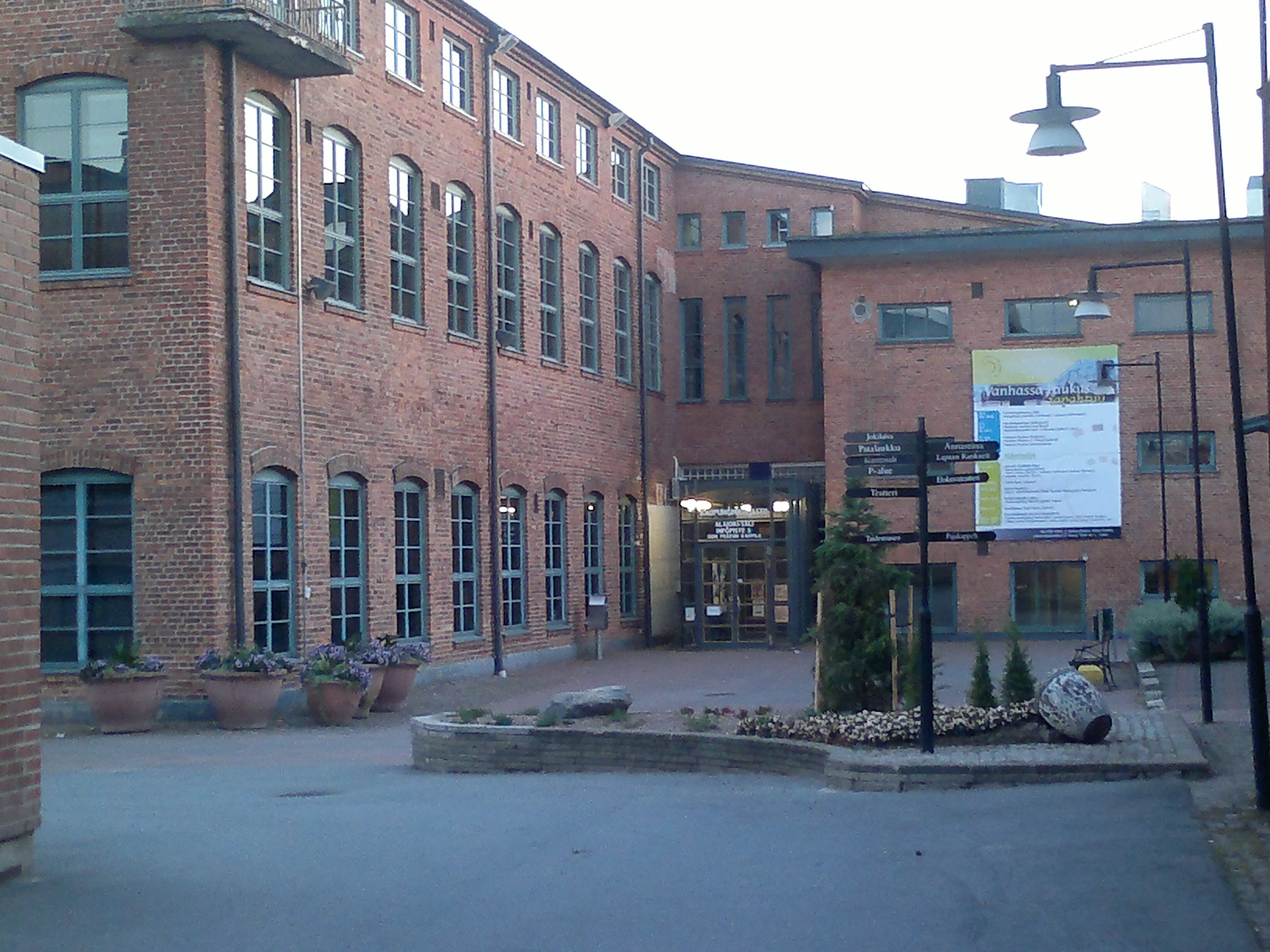 Kulttuurikeskus Vanha Paukku Lapualla.